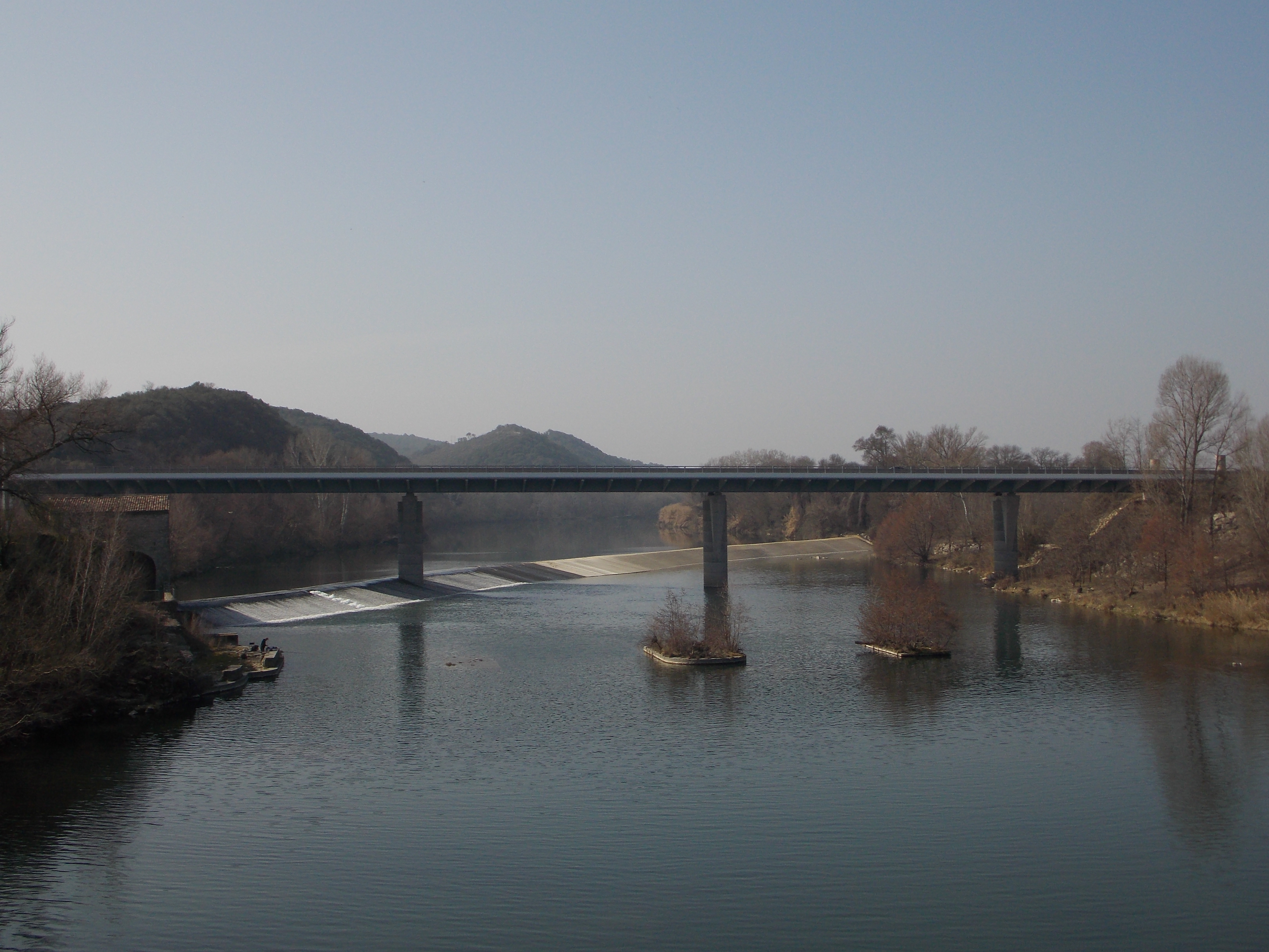 Nouveau pont de Ners.